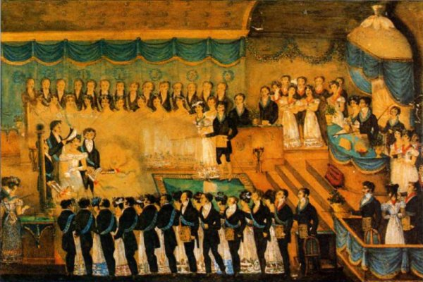 Réception d'une femme dans une loge d'adoption française sous le Premier Empire.